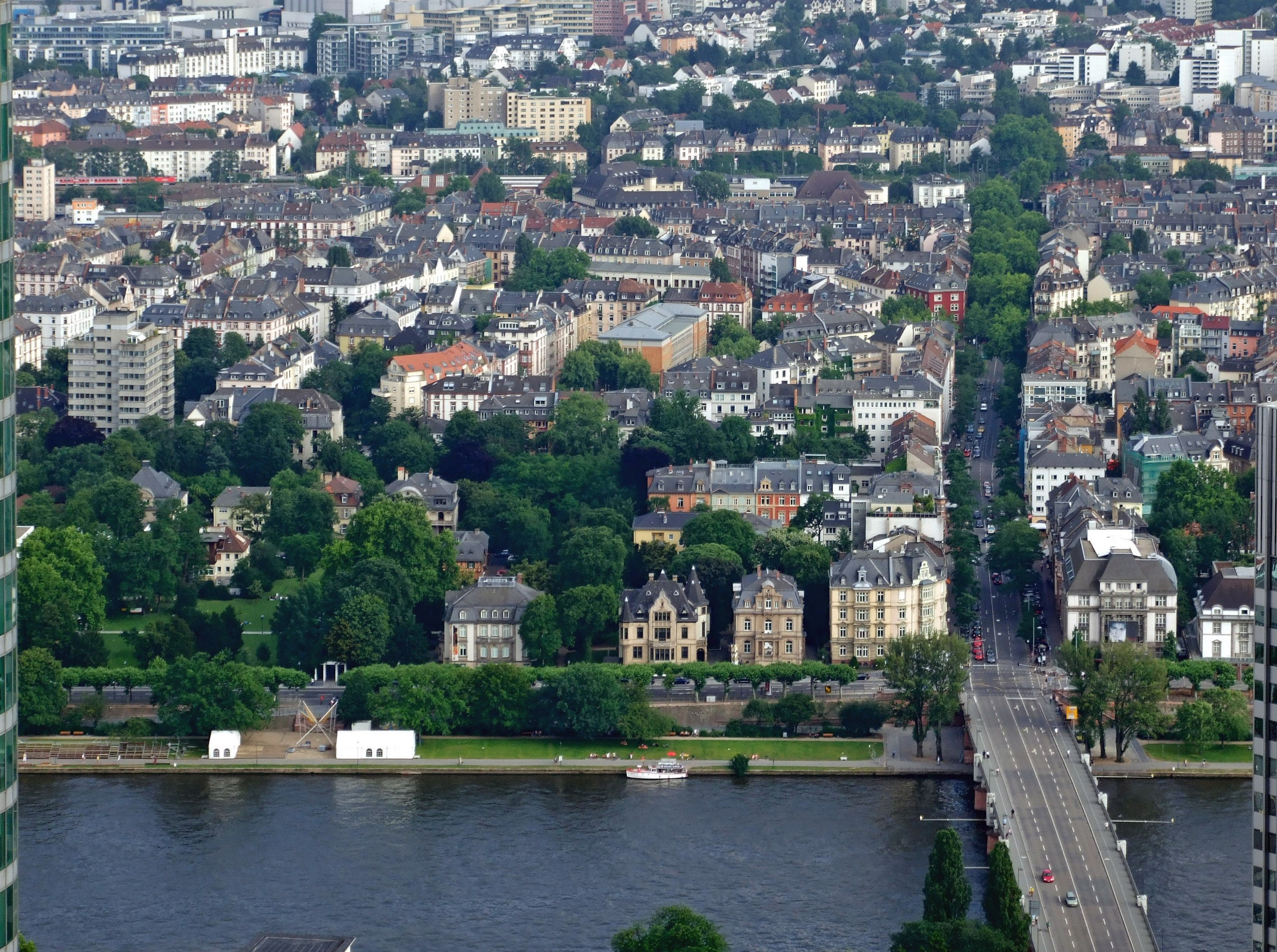 Mittelteil des Museumsufers mit den (drei) Häusern des Museums der Weltkulturen (links). Rechts von der Schweizer Strasse folgt das Filmmuseum und das Architekturmuseum. Das Museum für Angewandte Kunst wird links vom Commerzbank Tower und ein Teil des Architekturmuseums durch den Eurotower verdeckt.